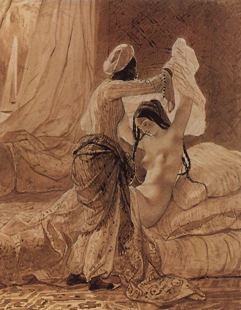 По установлению Аллаха раз в год меняется рубаха